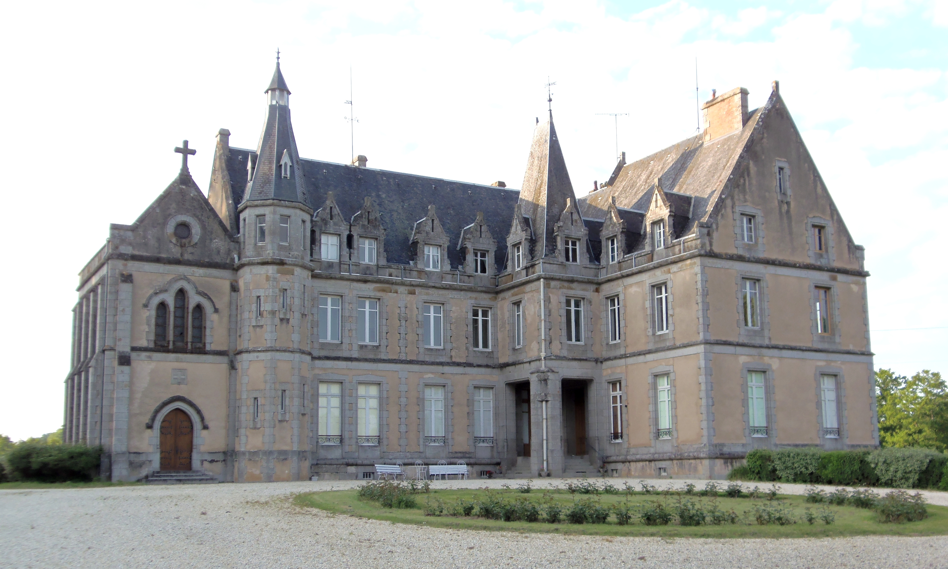 Launay-Villiers (Pays de la Loire, France). Le château de Villiers.